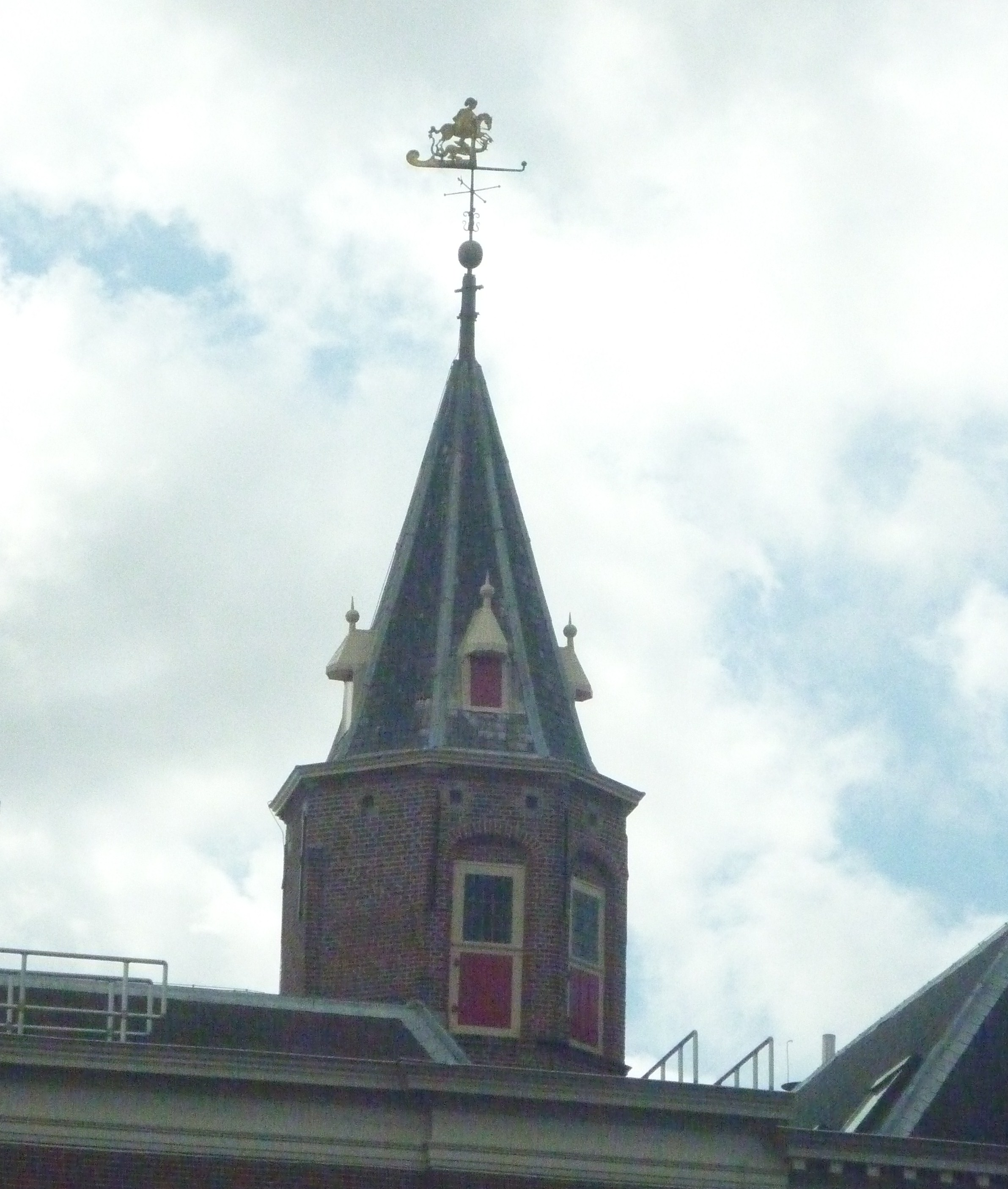 Toren van de St Jorisgilde in Den Haag, de rest van het gebouw is afgebroken.